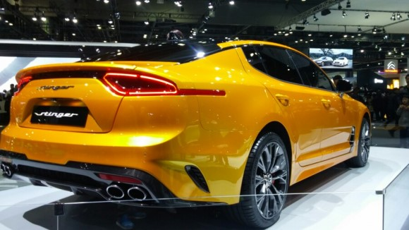 2017 기아 스팅어 카펠 에디션 후측면